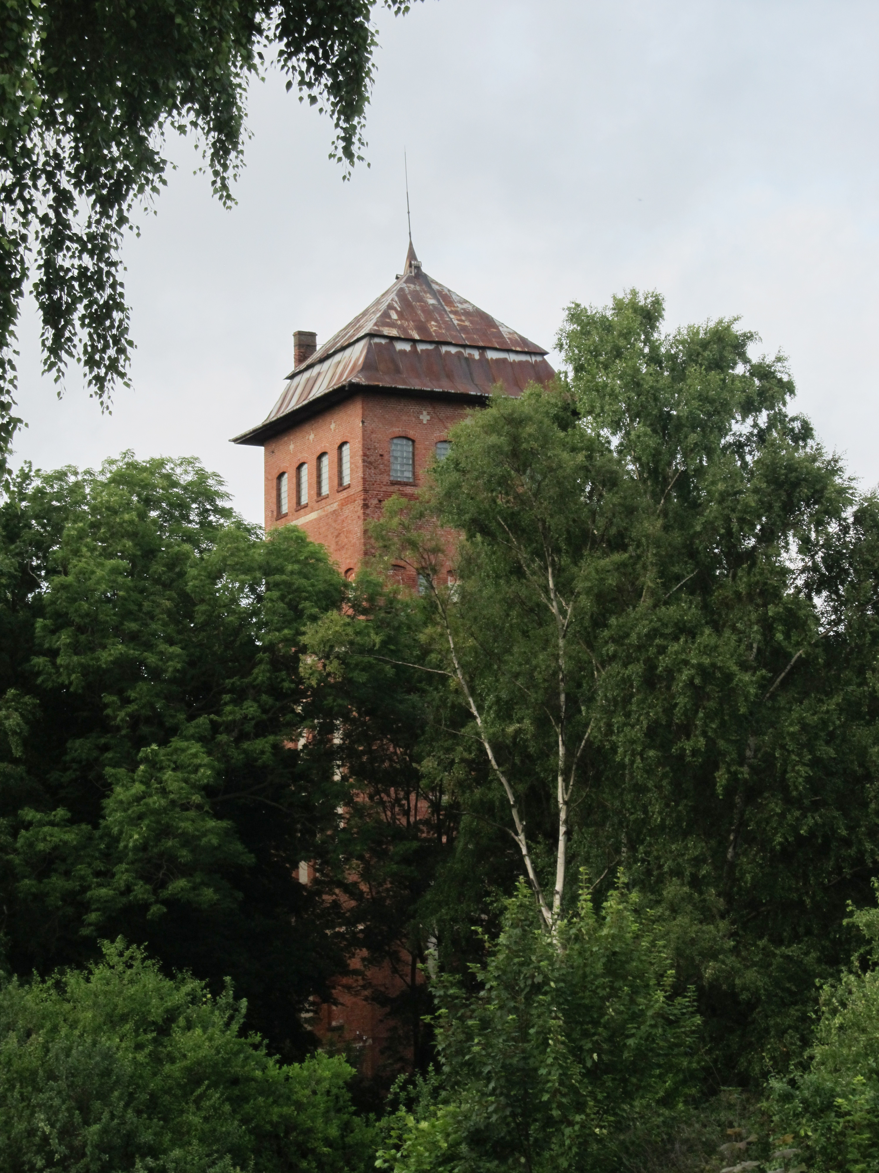 Wasser und Aussichtsturm, 1909, Georgenswalde / Otradnoje. Photo 2015